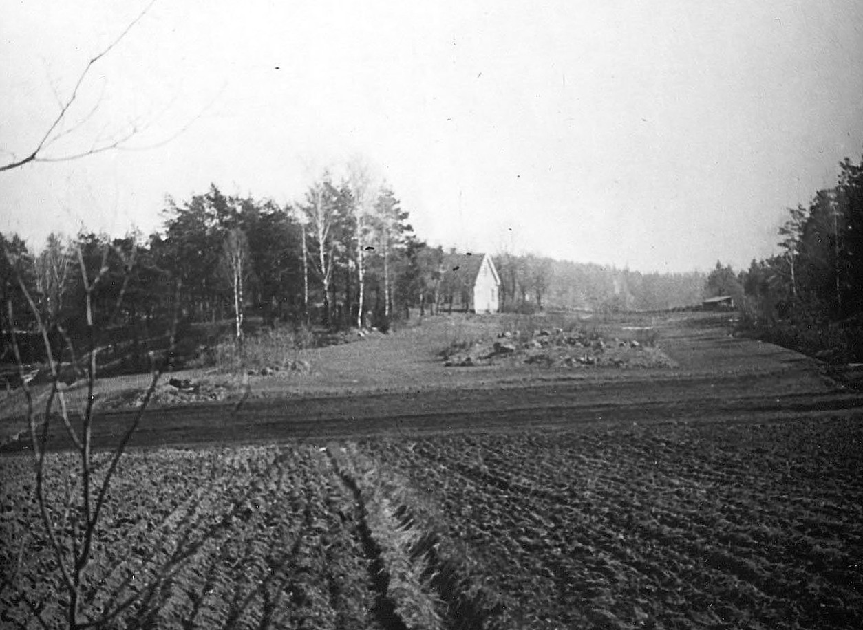 Bodals mangårdsbyggnad med vy över Bodals bollplan (2009) och park mot öster.